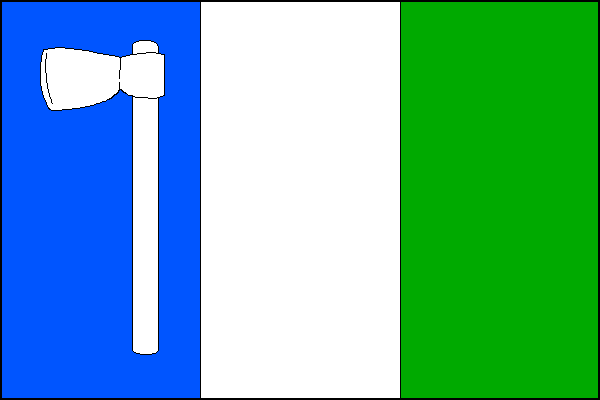 Flag of Valašské Příkazy